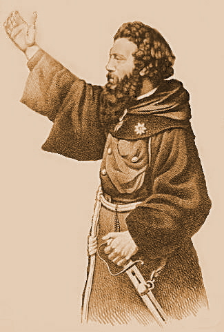 Ritratto del frate garibaldino Pantaleo - Litografia edita dai Fratelli Terzaghi nel 1861, ridotta, ritoccata.